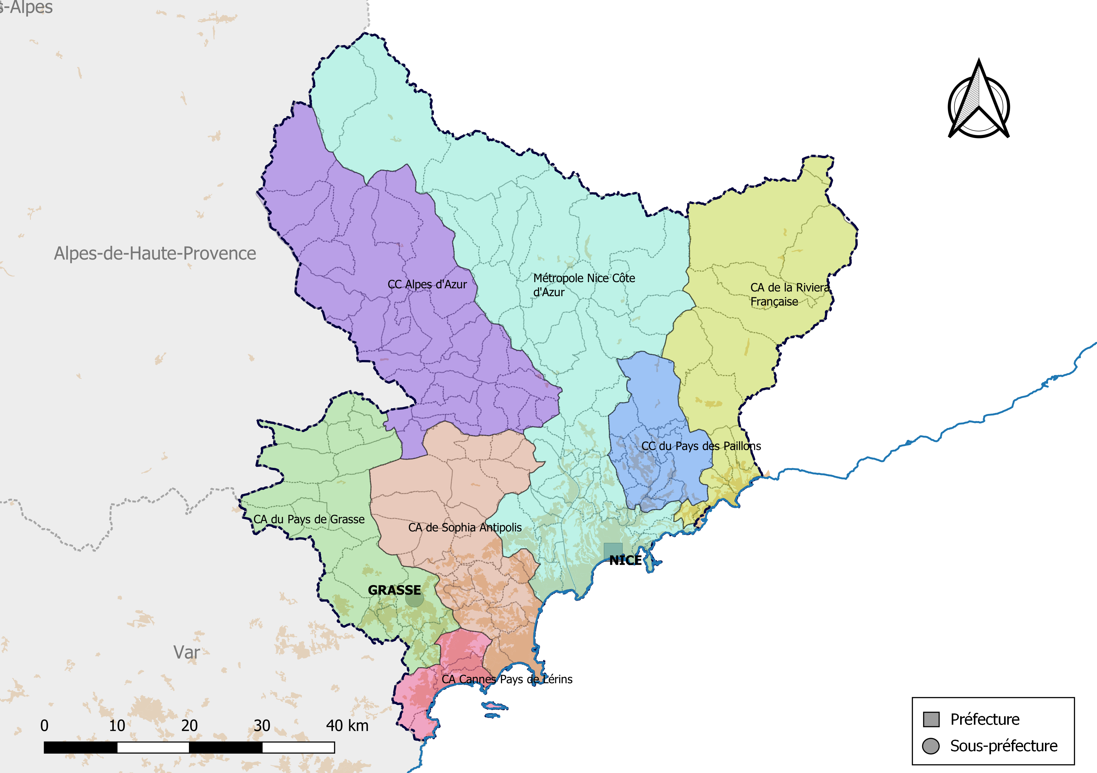 Carte des intercommunalités du département des Alpes-Maritimes, France. Composition au 1er janvier.2019